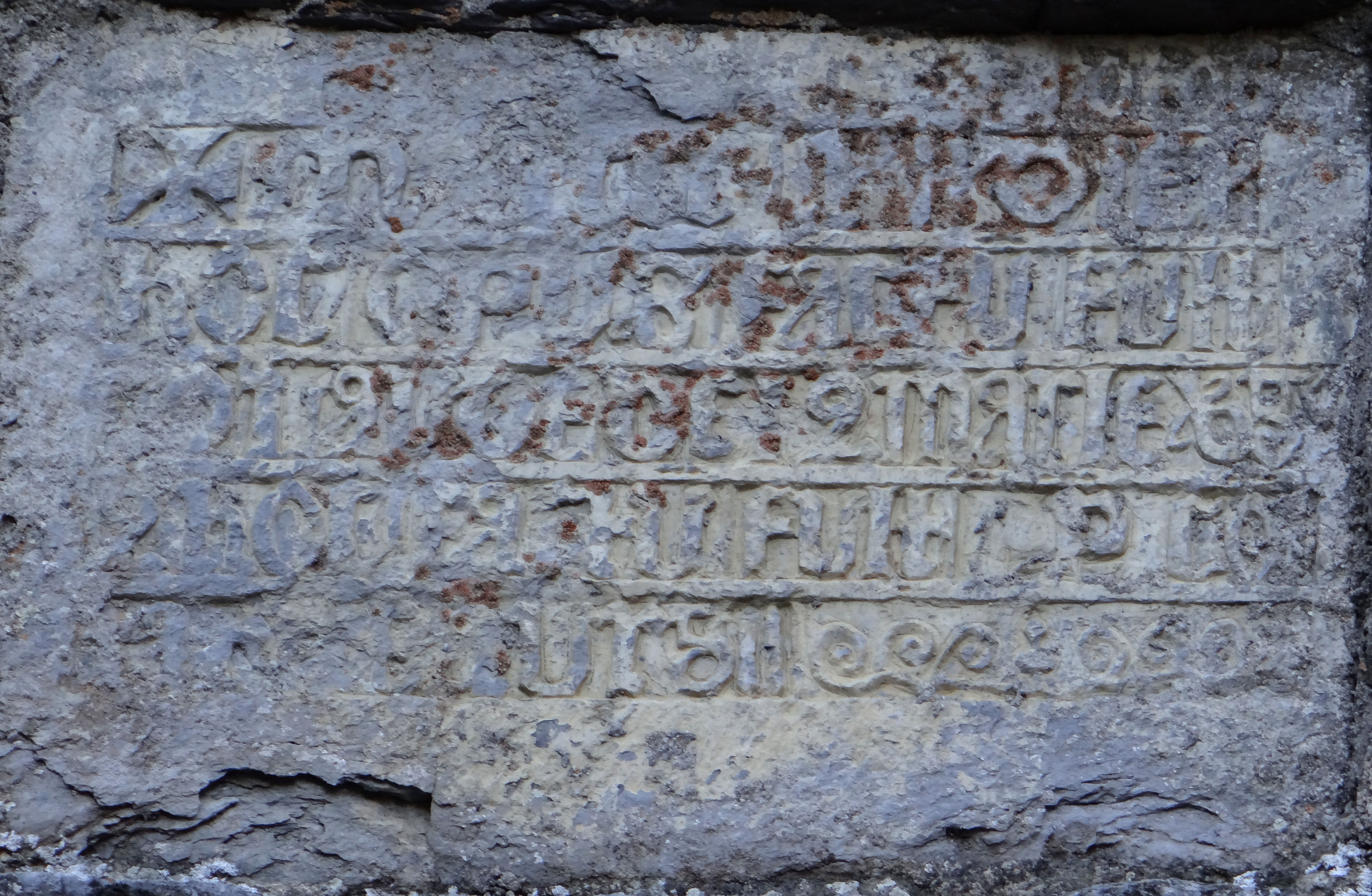 Saorge - Église de la Madone del Poggio - Inscription à la base du clocher